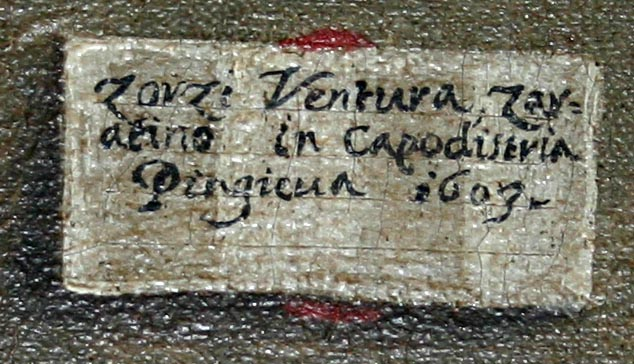 Foto personale